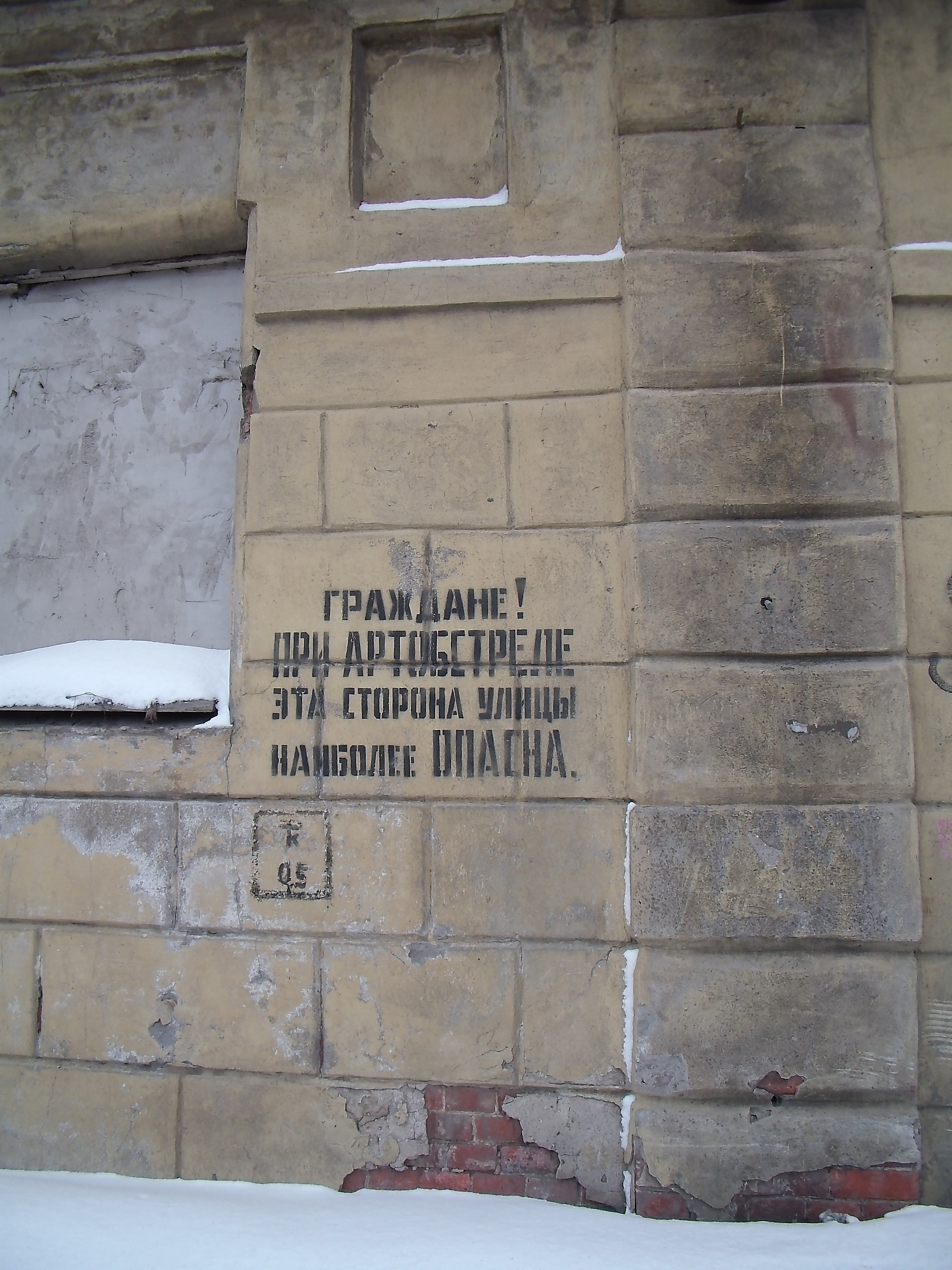 Улица Калинина, д. 6. Граждане! При артобстреле эта сторона улицы наиболее опасна